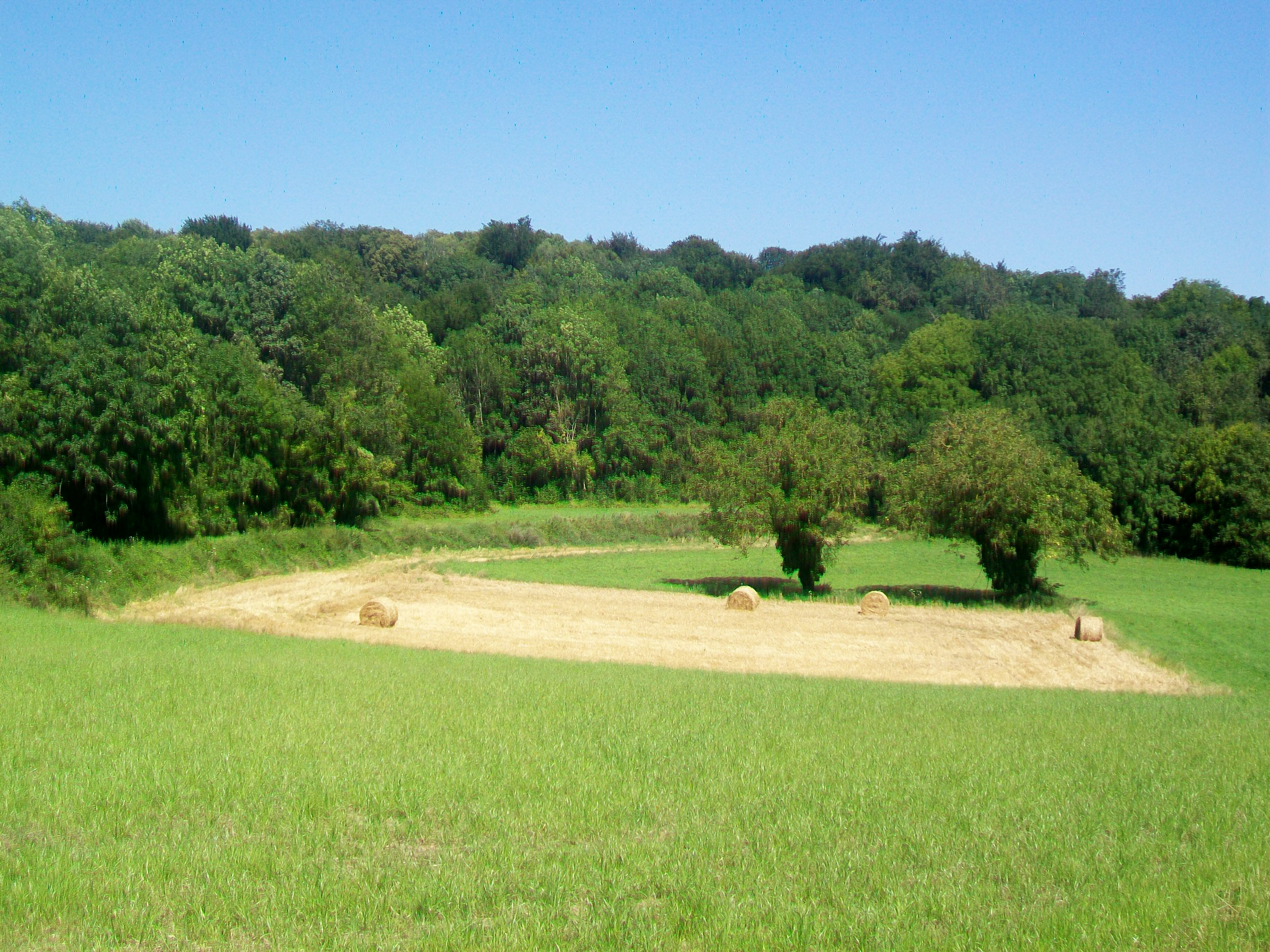 Vue vers la forêt depuis la rue du Grand Champ.